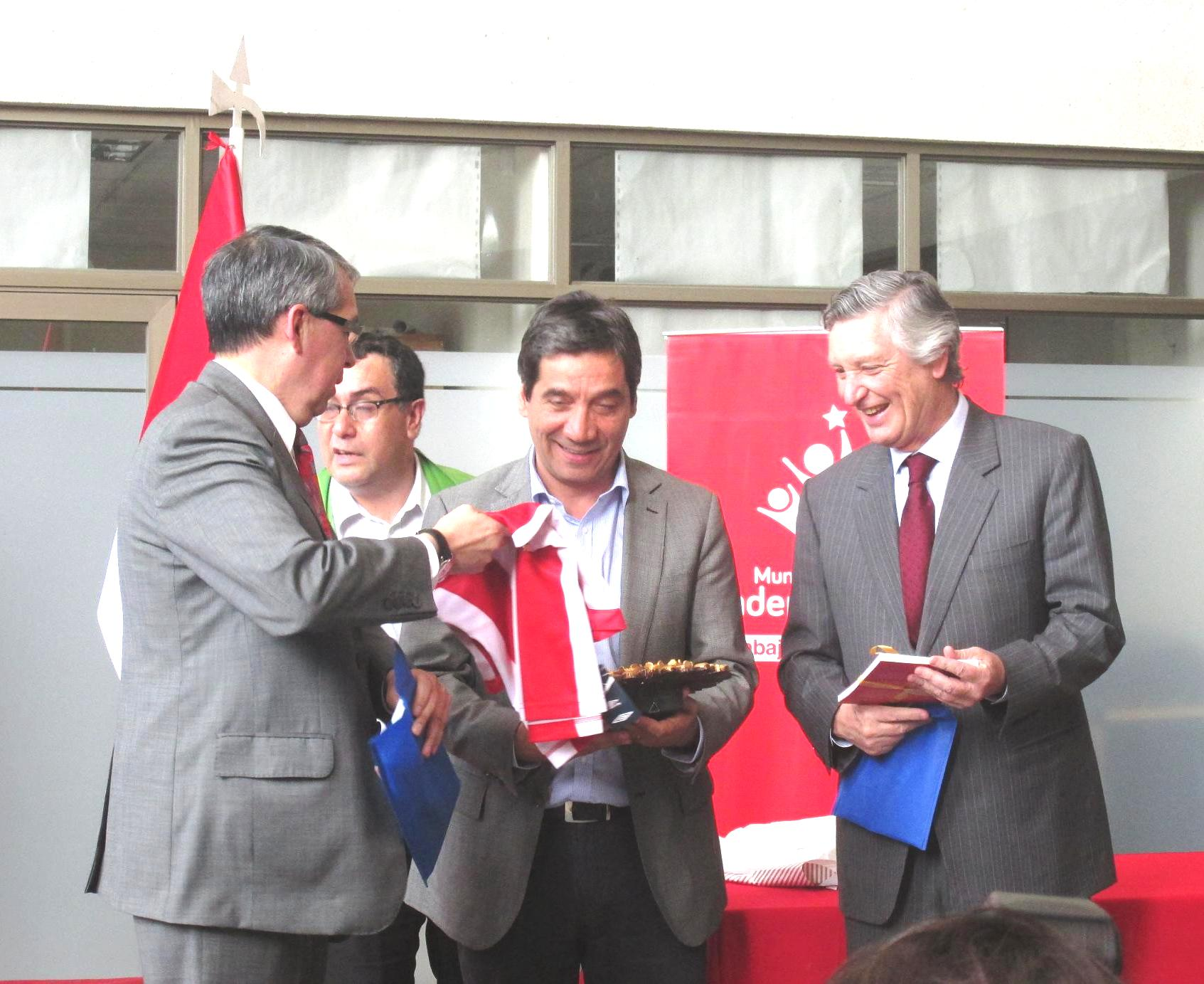 En la ciudad de Santiago, se realizó la presentación oficial ante los medios de comunicación del ‘Club Social y Deportivo Incas del Sur’, primer equipo de la comunidad peruana. En la ceremonia, el Embajador del Perú en Chile, Carlos Pareja pidió a los futbolistas constituirse en verdaderos ejemplos de conducta y superación para nuestros connacionales en Chile, porque ellos servirán de enlace para integrar aún más a los dos países a través del deporte. El Cónsul General del Perú en Santiago, Alejandro Riveros, entregó la camiseta oficial del Club al alcalde de la comuna de Independencia, Gonzalo Durán. El equipo peruano inicia su participación en la Tercera División B de Chile este sábado 26 contra el equipo de la Gendarmería de Chile.